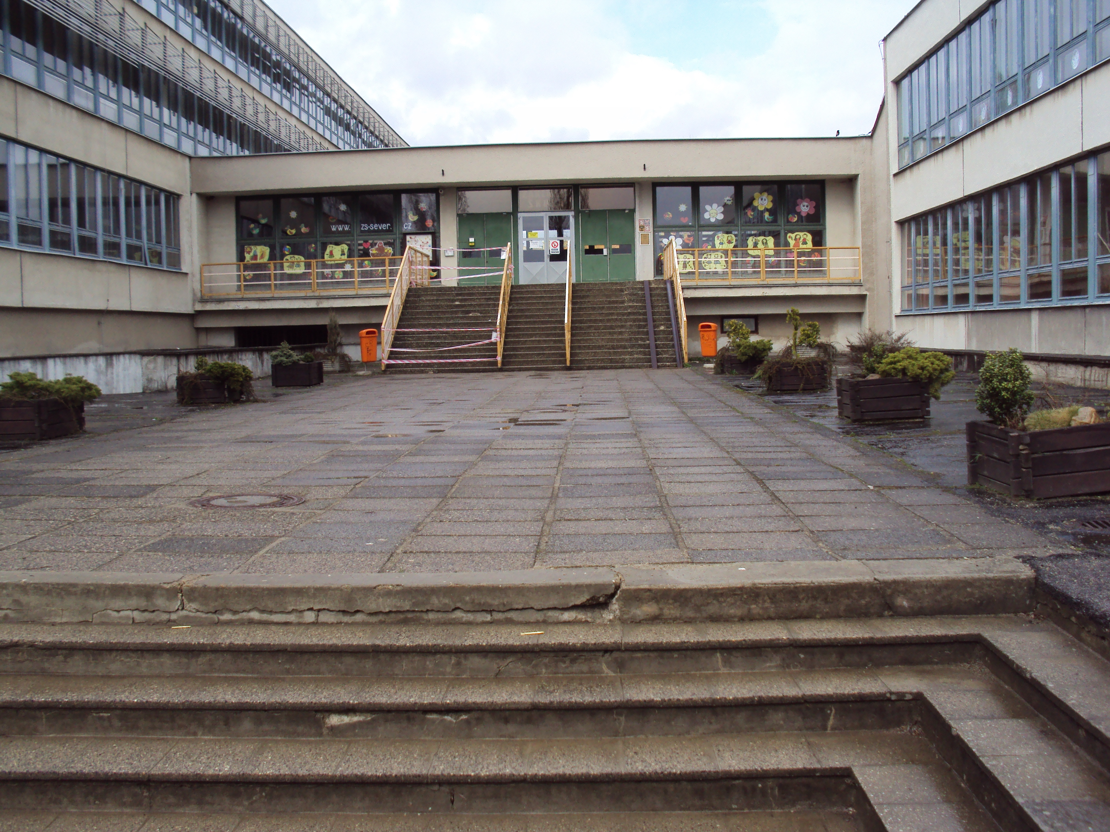 Základní škola Sever Česká Lípa, vlevo je budova bazénu